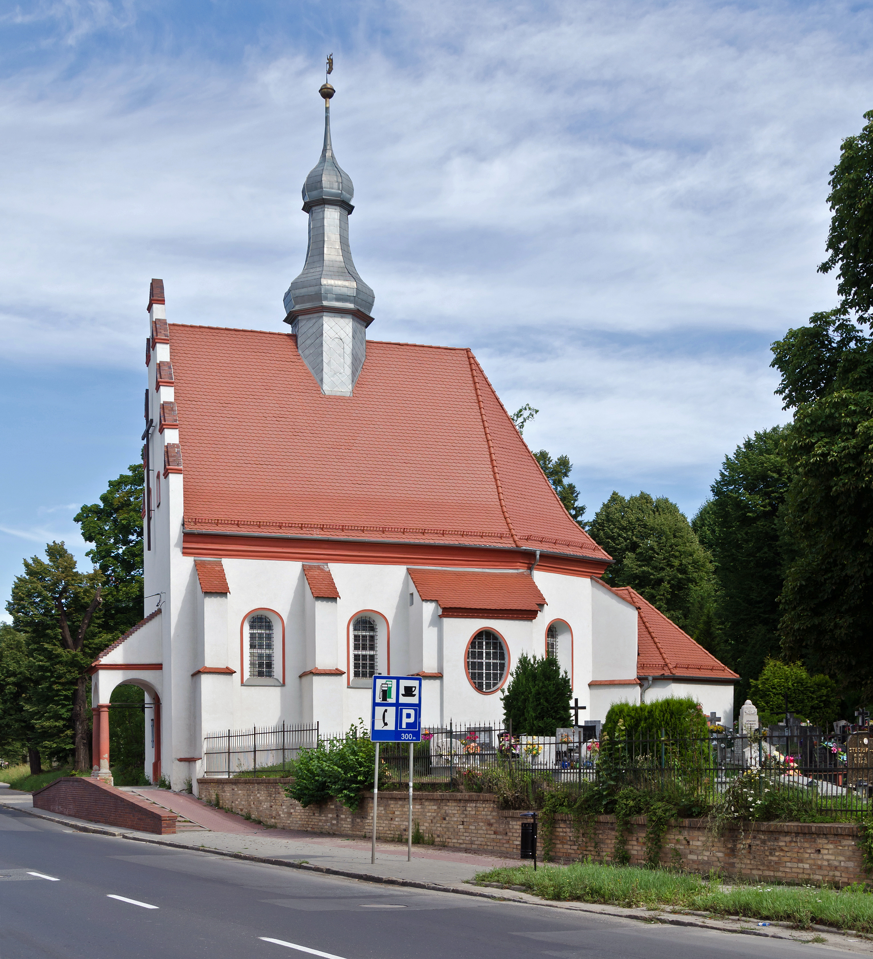 Nysa, kościół cmentarny p.w. Św. Krzyża, tzw. Jerozolimski, 1633, 1678, 1897